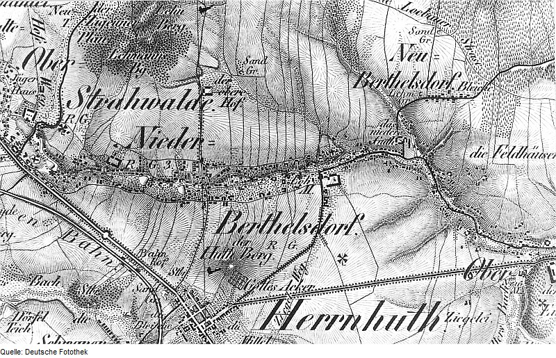 Original image description from the Deutsche Fotothek Berthelsdorf. Oberreit, Sect. Zittau, 1844/46